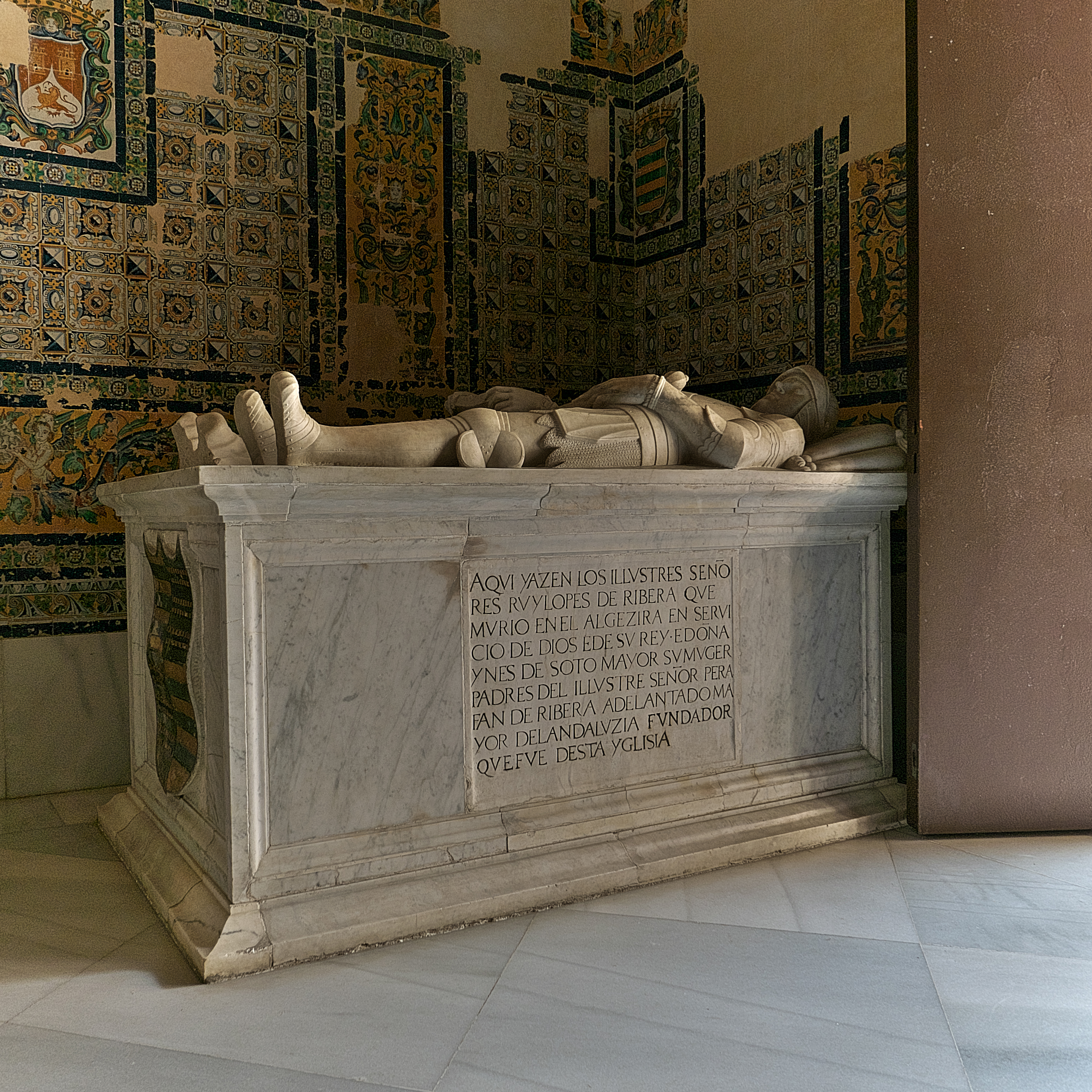 Capilla del Capítulo, Cartuja de Sevilla. Sepulcro de mármol de Ruy López de Ribera y de Inés de Sotomayor, su mujer. Patronos de la Cartuja de Santa María de las Cuevas.